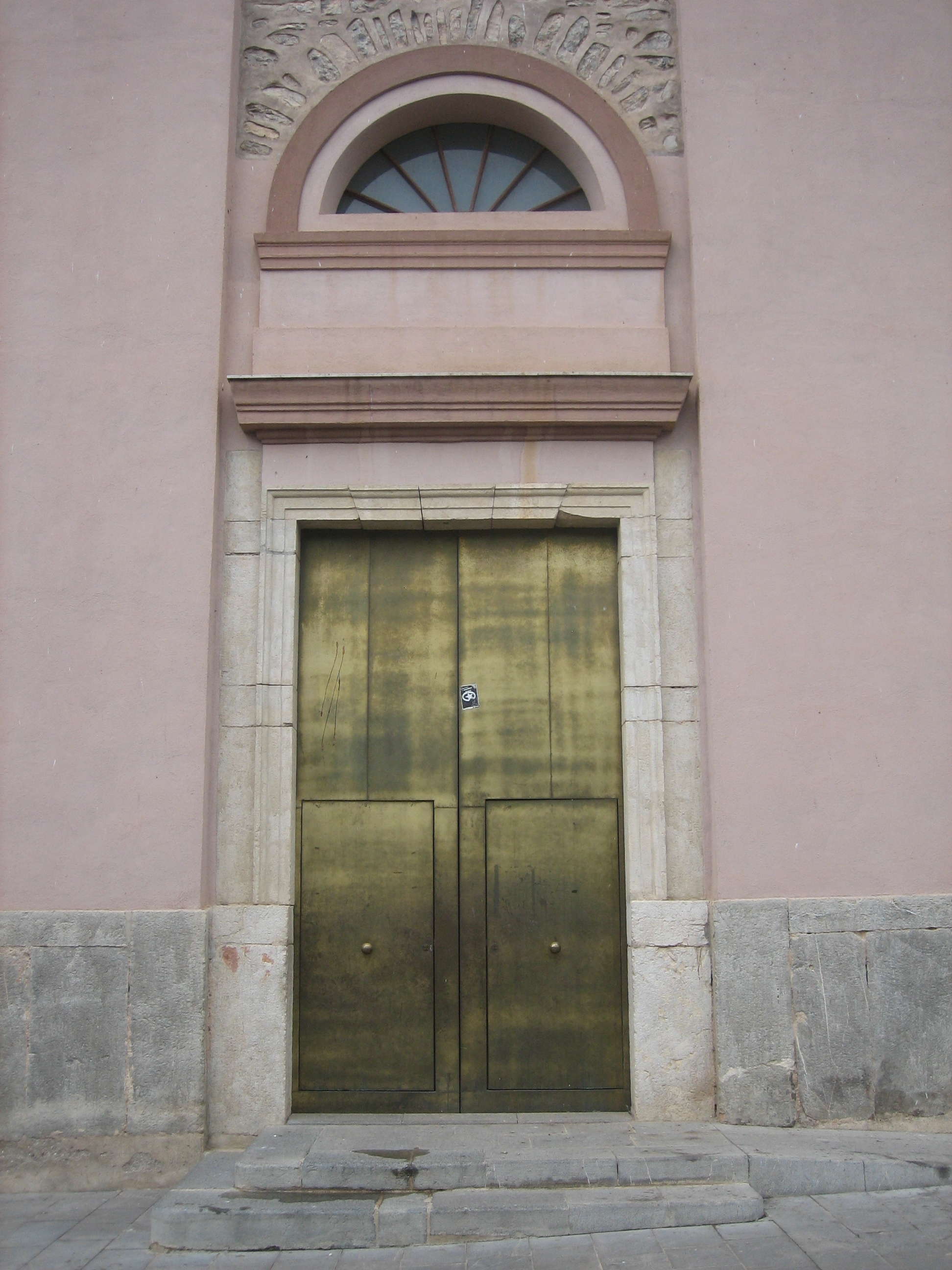 Portada de l'església de Santa Magdalena de Polpís (Baix Maestrat)